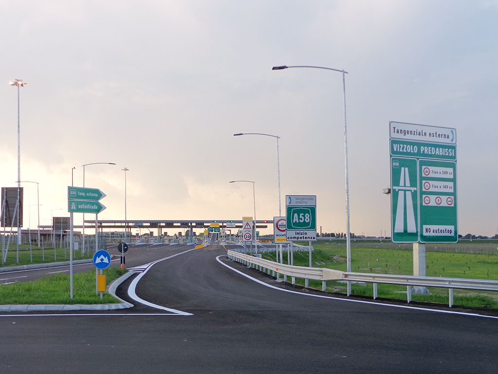 Vizzolo Predabissi, ingresso autostradale.